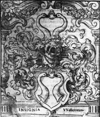 Das Wappen der Familie von Mailsdorp zeigt zwei Schwanenhälse, die sich anschauen und dabei mit ihren Schnäbeln einen Ring halten. Die Familie von Maisldorp - vermutlich Freie Reichsritter - ist ab 1180 in der Region nachweisbar. Der Hof der Familie von Mailsdorp lag im heutigen Deelen. Er spaltete sich im Laufe von Jahrhunderte in die eigenständigen Höfe: Genshof, Damianshof und Flockenhof auf. Das Wappen der thüringischen Stadt Molsdorf weist ein hohes Maß an Übereinstimmung auf.